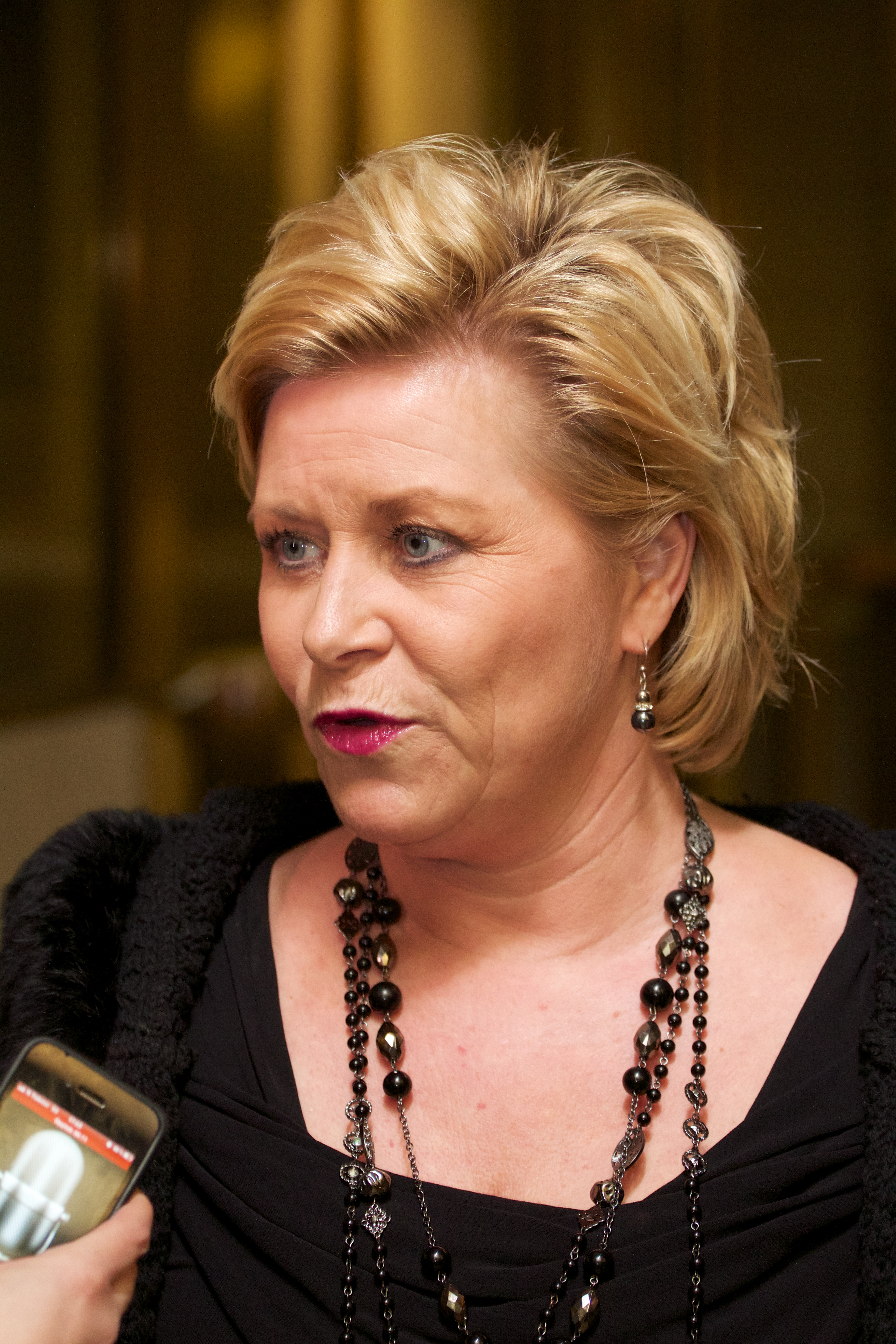 Siv Jensen.